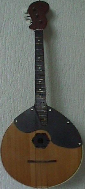 eigen foto (GFDL)